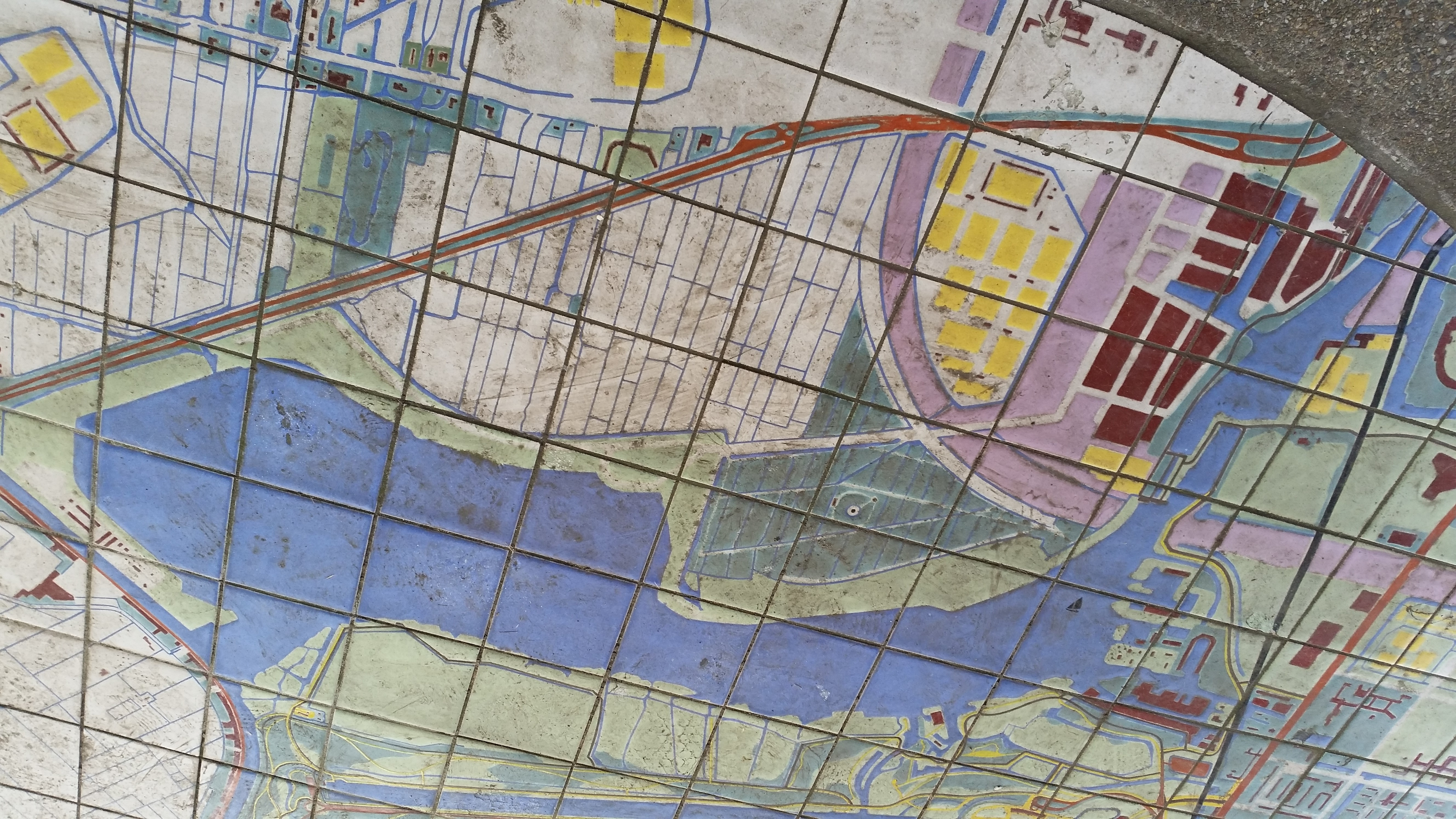 Nieuwe Meer op Kaartplateaus Amsterdamse Bos